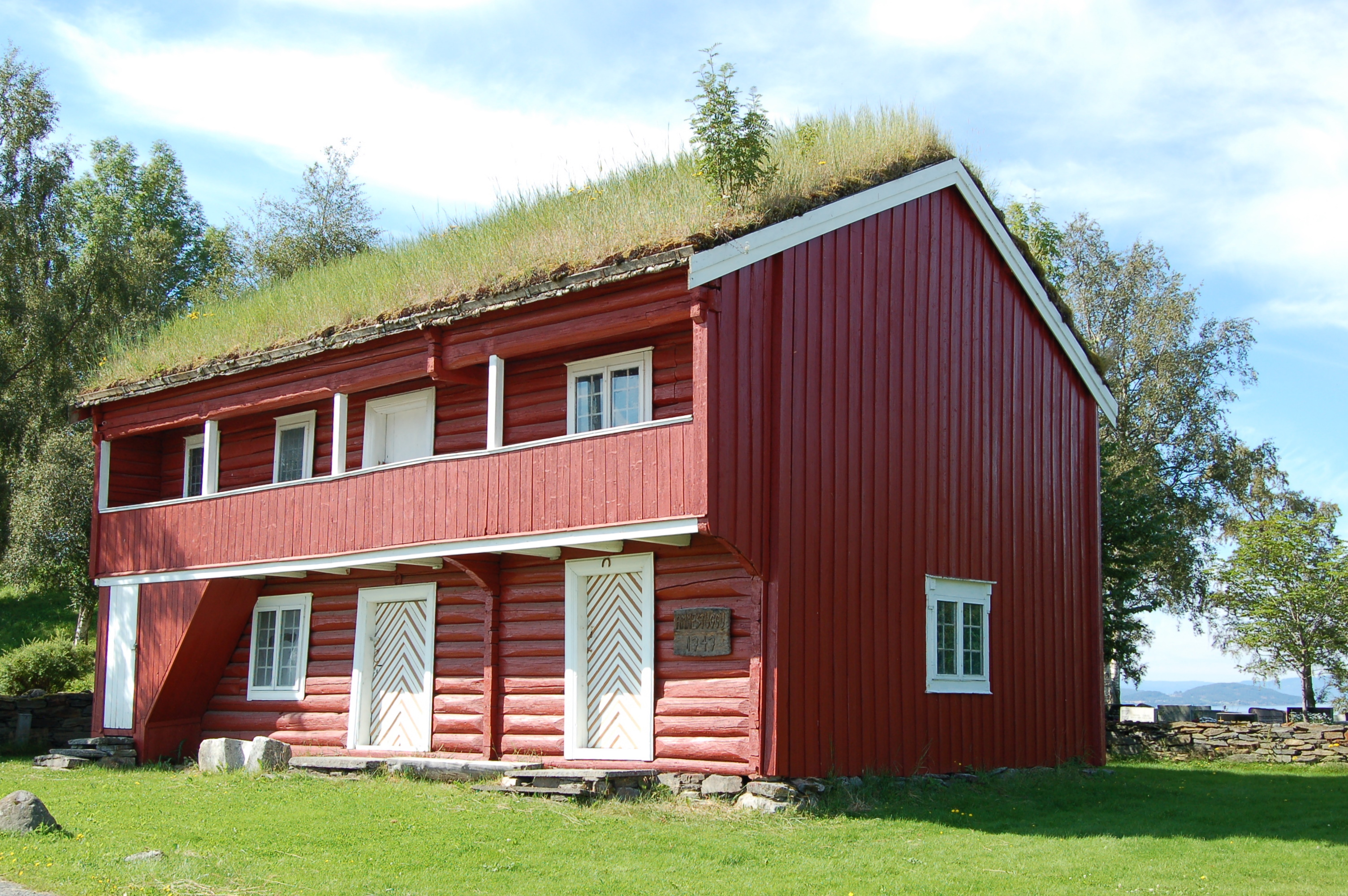 Ammestua ved Alstadhaug kirke i Skogn